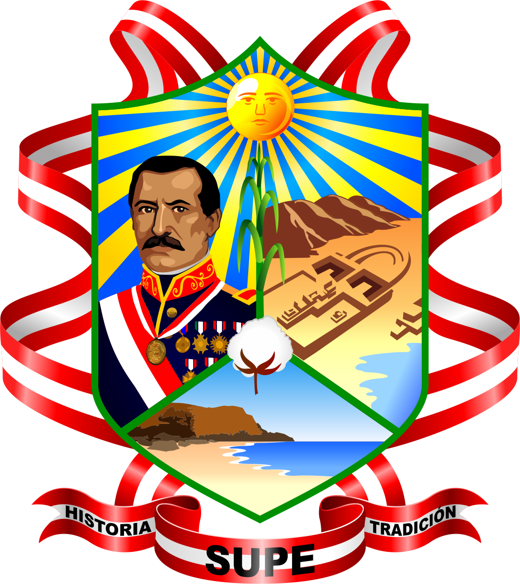 Distrito de Supe - Provincia de Barranca - Región Lima